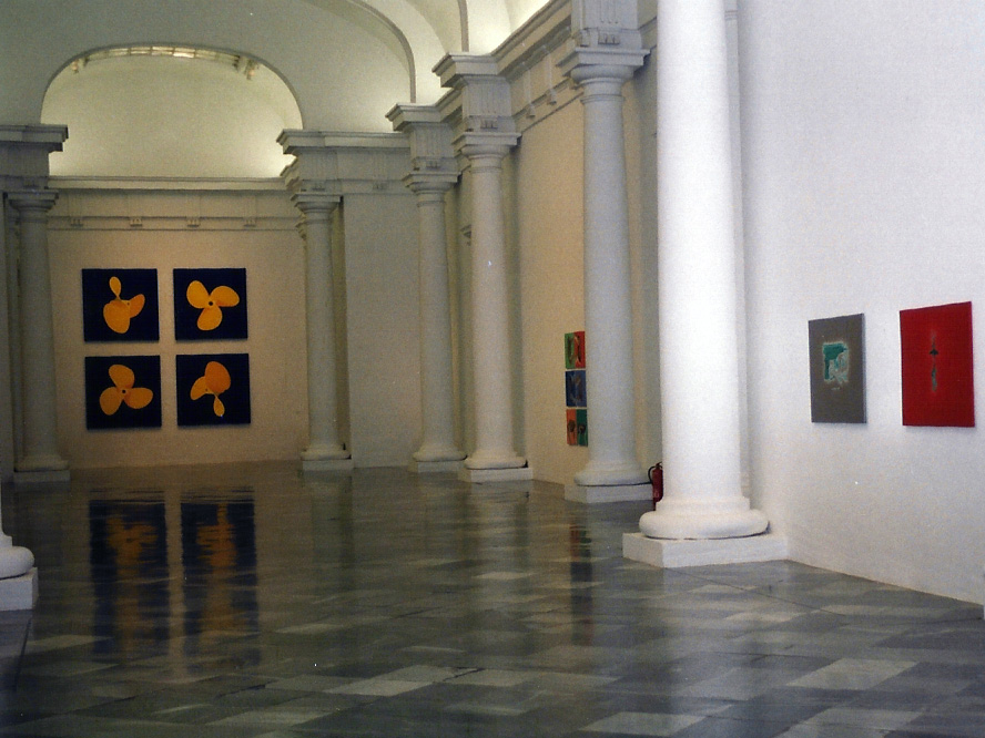 Exposición de Manuel Sáez. Vista del Centro del Carmen, IVAM. 2000. Valencia. España